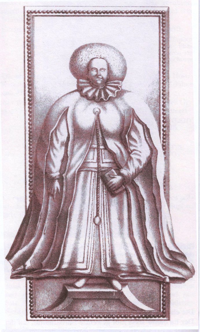 Stukko-Flachrelief von Leutolds Gattin Agnes von Traberg, um 1690. Die Pfarrkirche Hl. Katharina (Stainz).